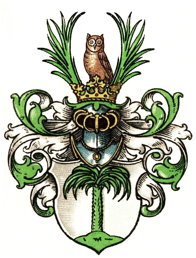 Stammwappen der (Herren von) Palm. Reichsritterstand mit „Edler von“ und Wappenbesserung (roter Balken mit dem Buchstaben I (= für Kaiser Joseph I., der 1711 den Adel verlieh) und der römischen Ziffer I (= ebenfalls für Kaiser Joseph I.) Wien 13. Februar 1711.